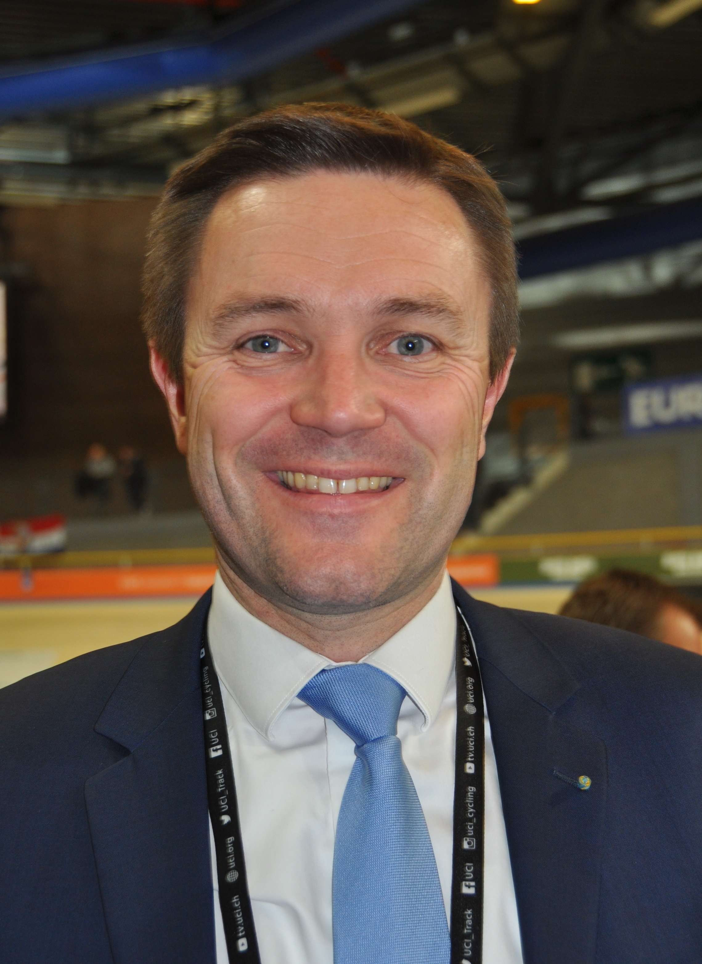 Daniel Lappartient, Präsident der UCI